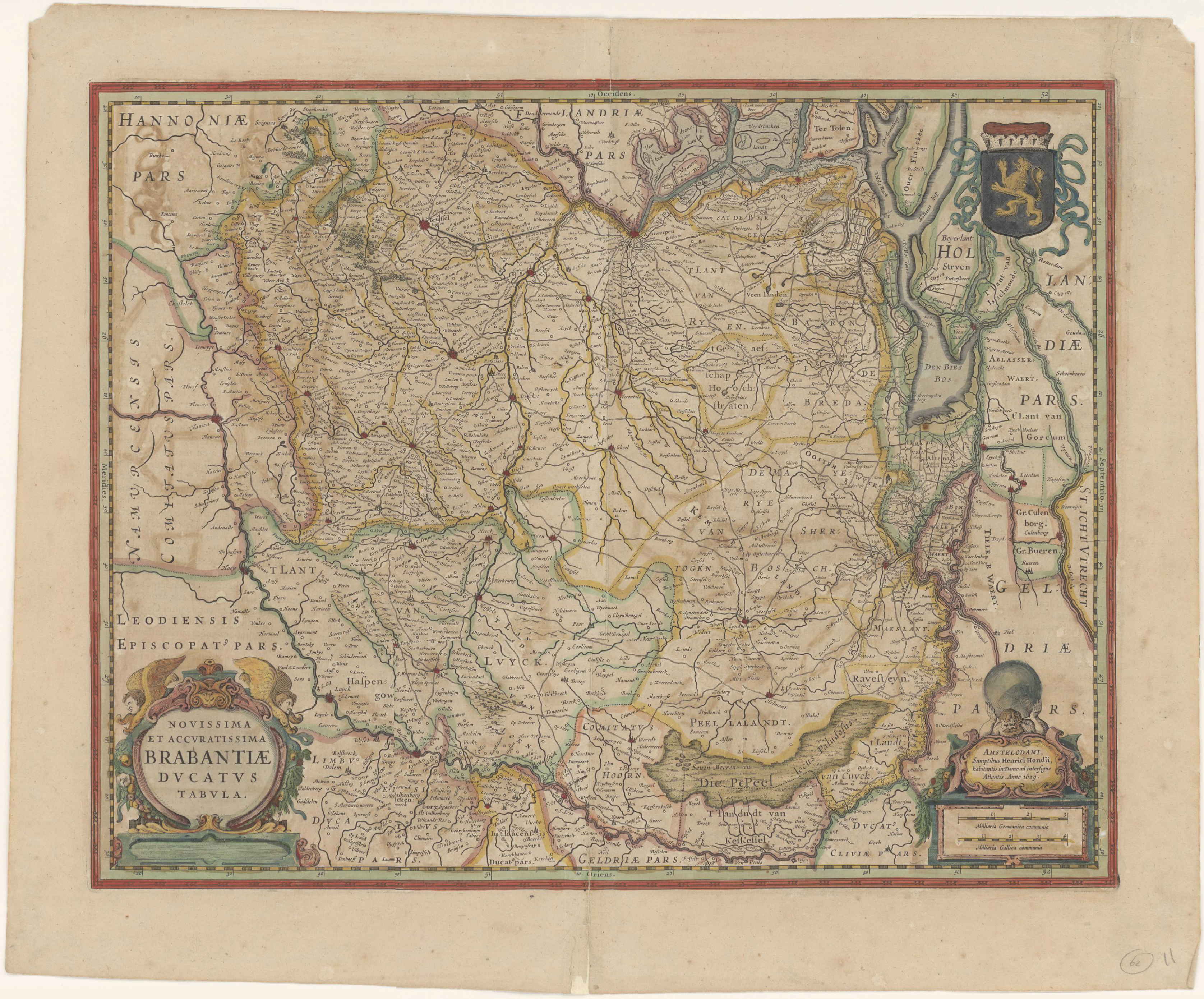 Novissima et Accuratissima Brabantiae Ducatus Tabula Sumptibus Atlantis.